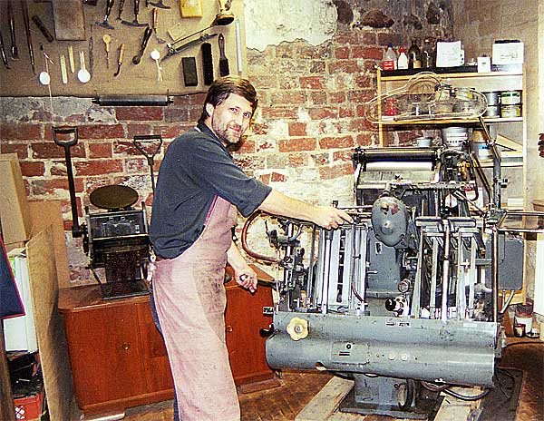 Druckstube in der Lutherstadt Wittenberg im Cranachhof Schlossstrasse 1